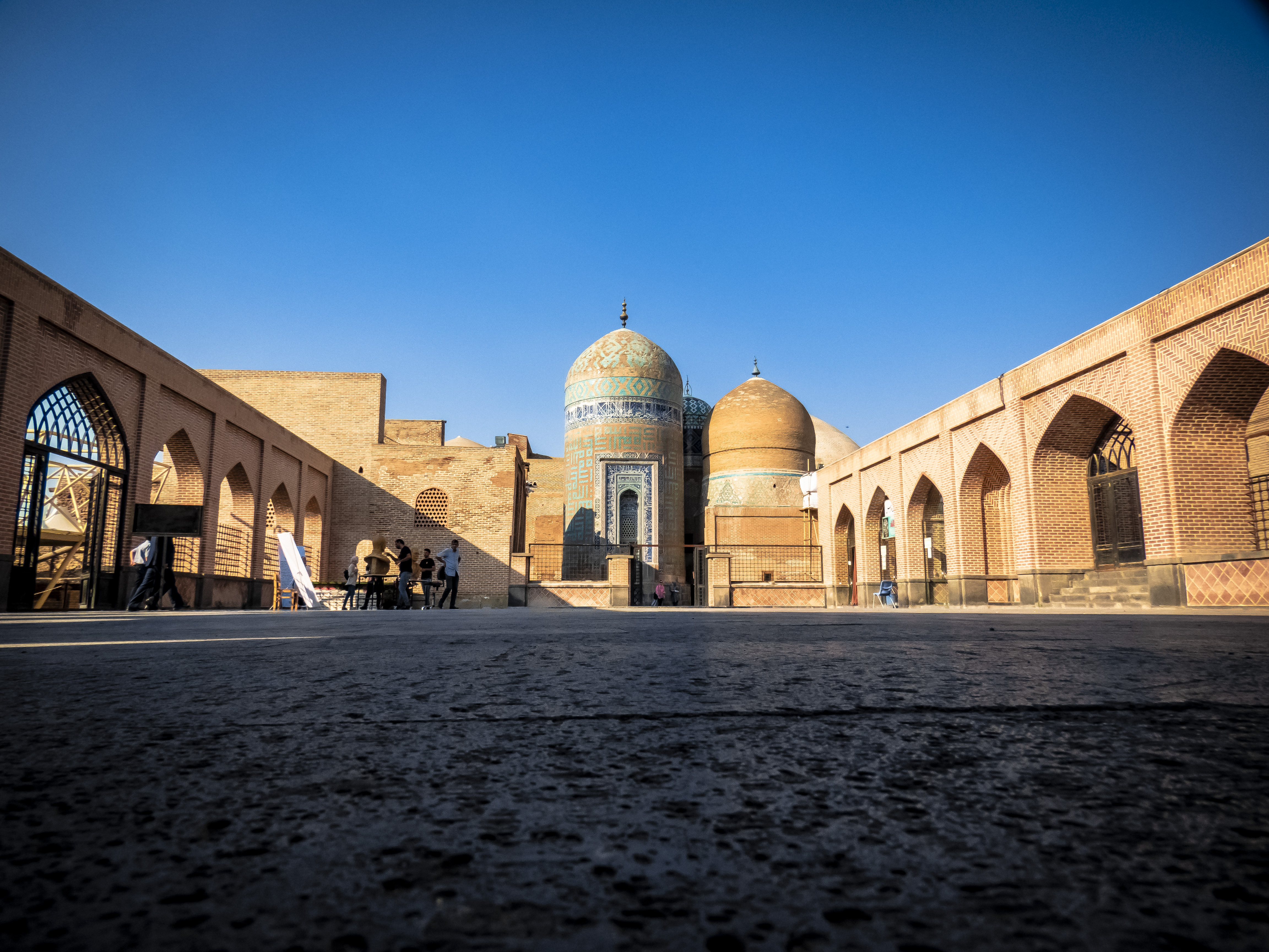 مقبره شیخ صفی‌الدین و بناهای متعلق آن